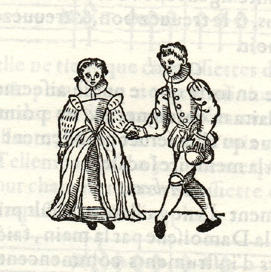 Révérence, de Thoinot Arbeau